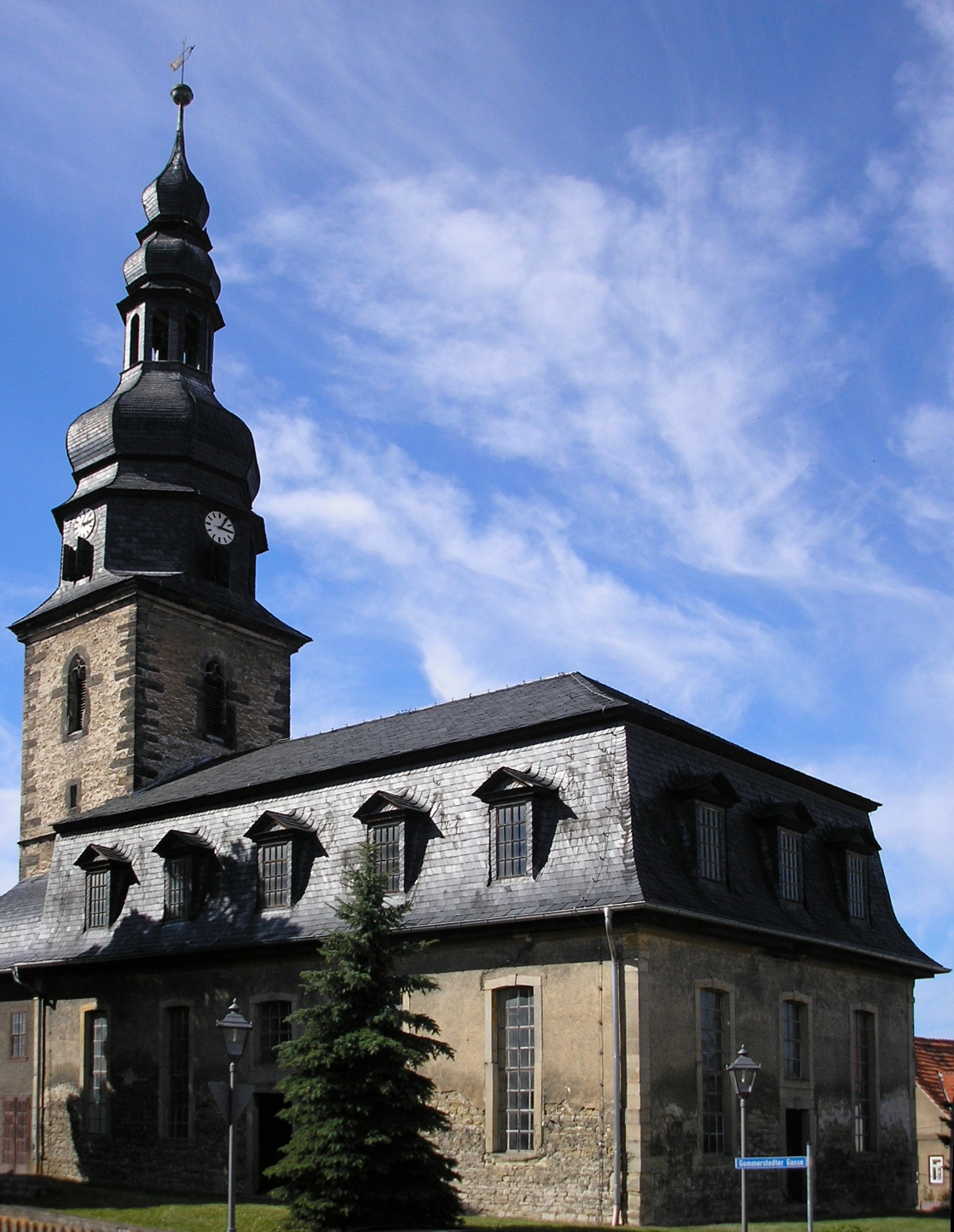 Die Kirche von Wüllersleben (Ilm-Kreis, Thüringen, Deutschland)